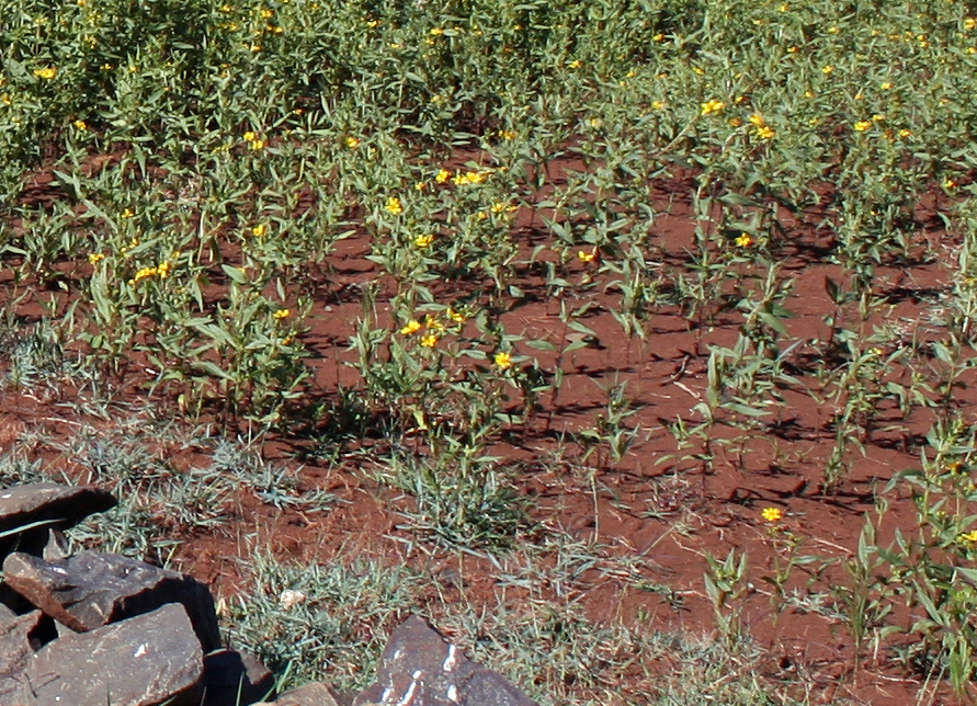 Ramtillkraut